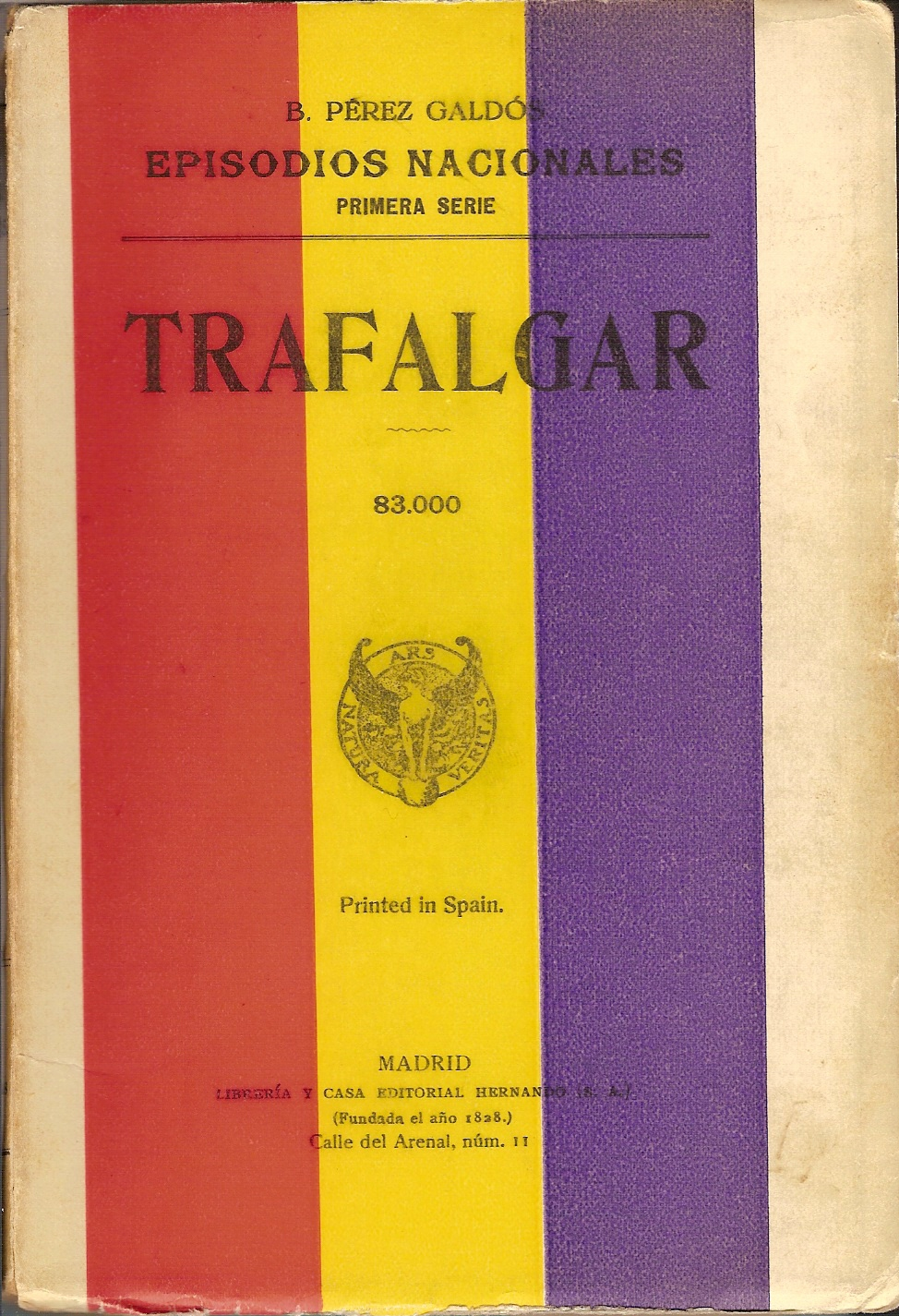 Portada del Episodio Nacional Trafalgar, publicado por la Librería y Casa Editorial Hernando (S. A.) en Madrid, 1935